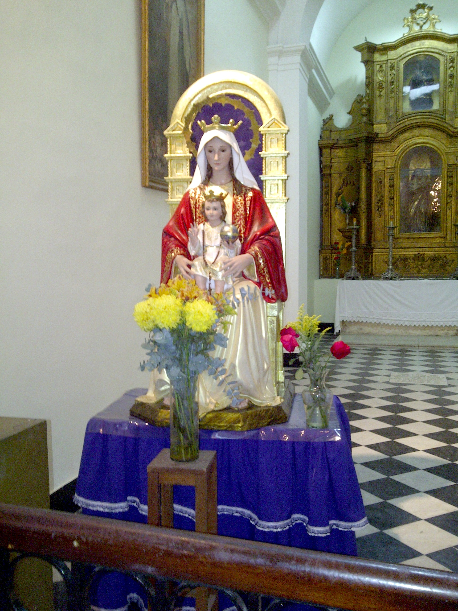 Imagen de la Virgen de Coromoto en la Catedral de Caracas - venezuela (2012)